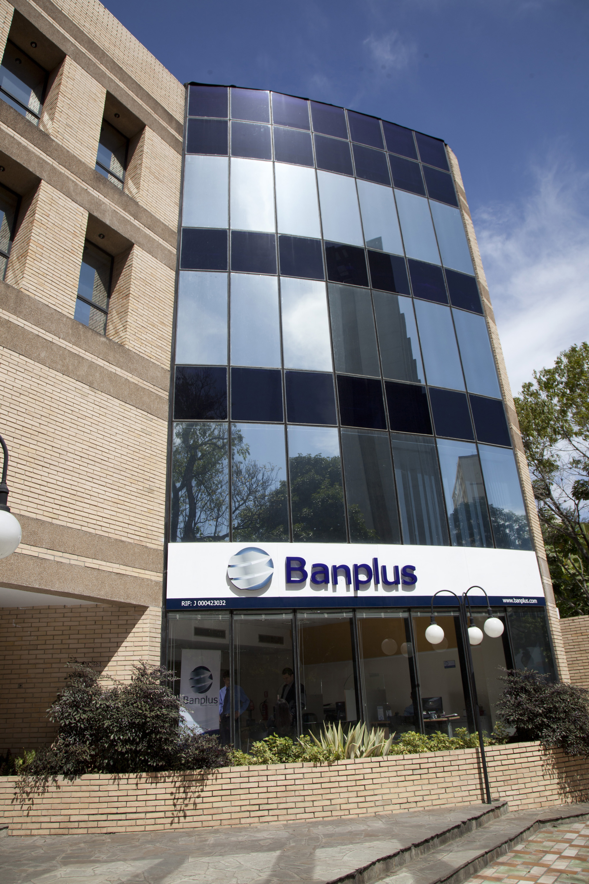 Agencia Banplus, institución bancaria dirigida por Diego Ricol.